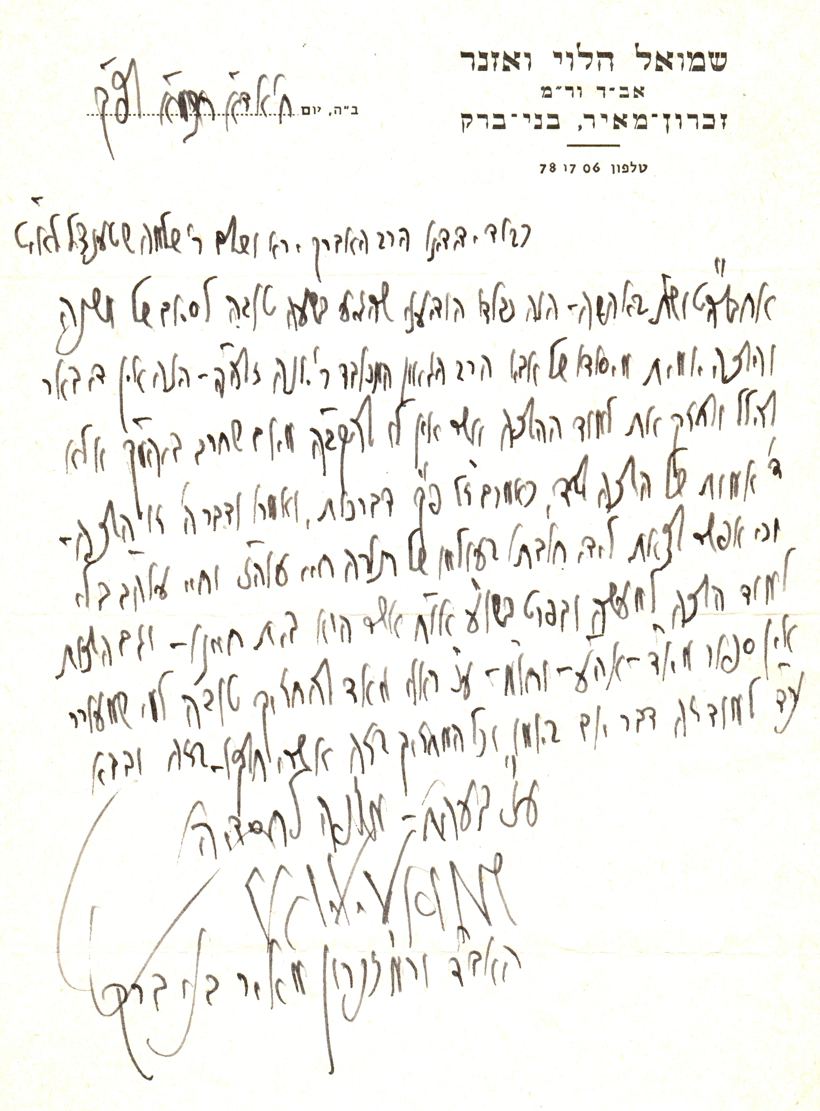 ראש ישיבת חכמי לובלין הגאון הרב שמואל הלוי וואזנר על חשיבות לימוד ההלכה היומית שיזם הרב יונה שטנצל זצ"ל